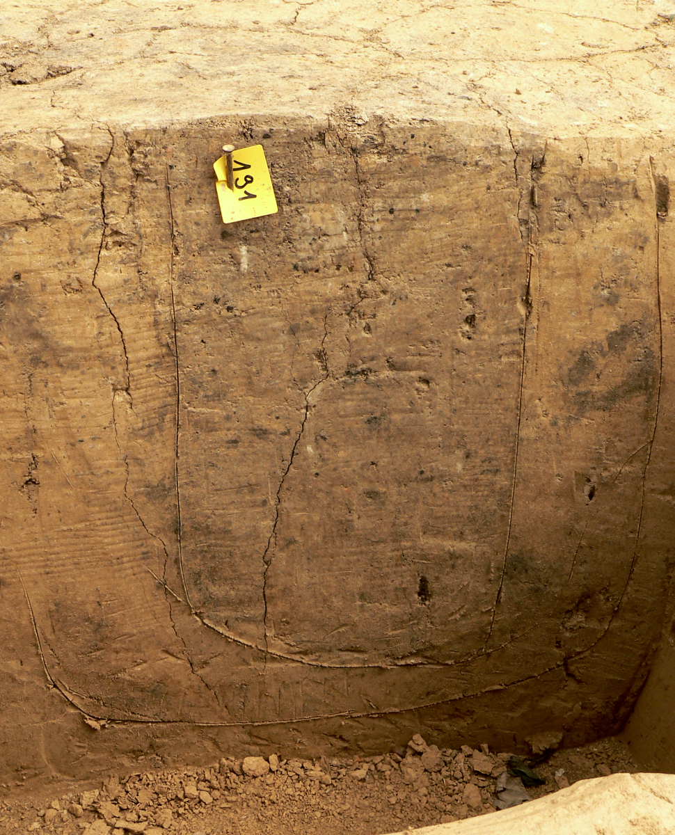 Bandkeramischer Fundplatz von Imbshausen und Eboldshausen Autobahn, Pfostengrube